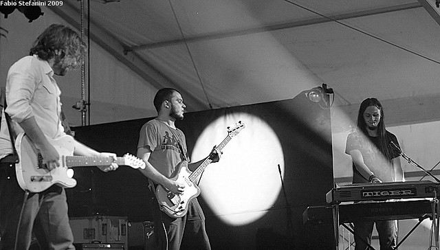 I Calibro 35 in concerto ad Osnago nel 2010